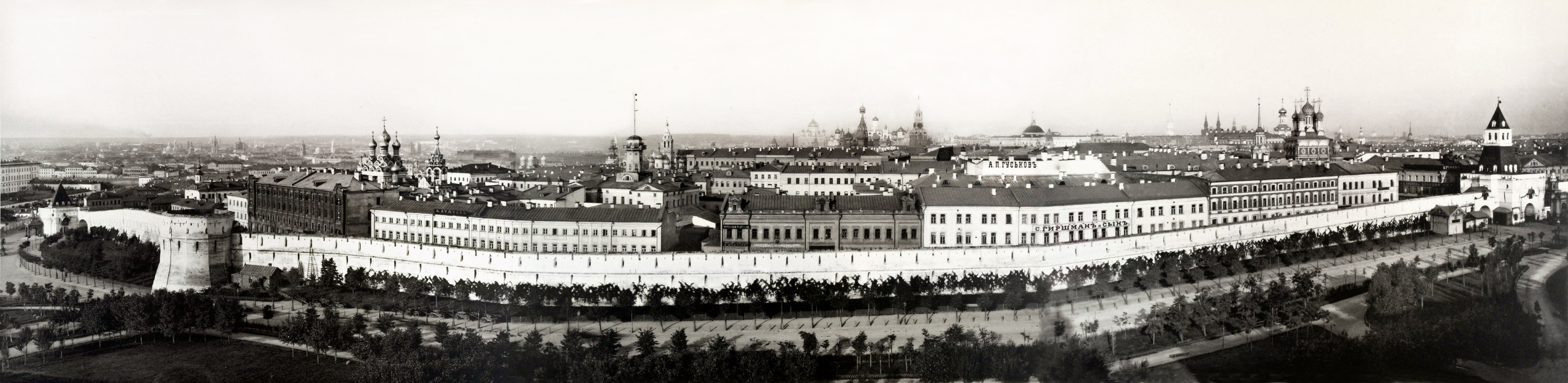 Панорама Китай-города из нескольких снимков, представленных в альбоме Н. А. Найдёнова "Москва. Виды некоторых городских местностей, храмов, примечательных зданий и других сооружений."